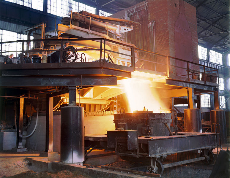 مصنع صناعه الصلب